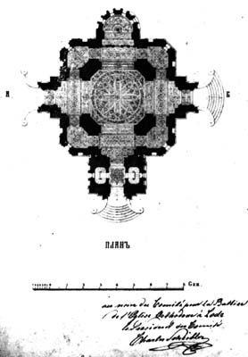 Cerkiew prawosławna Aleksandra Newskiego (plan)